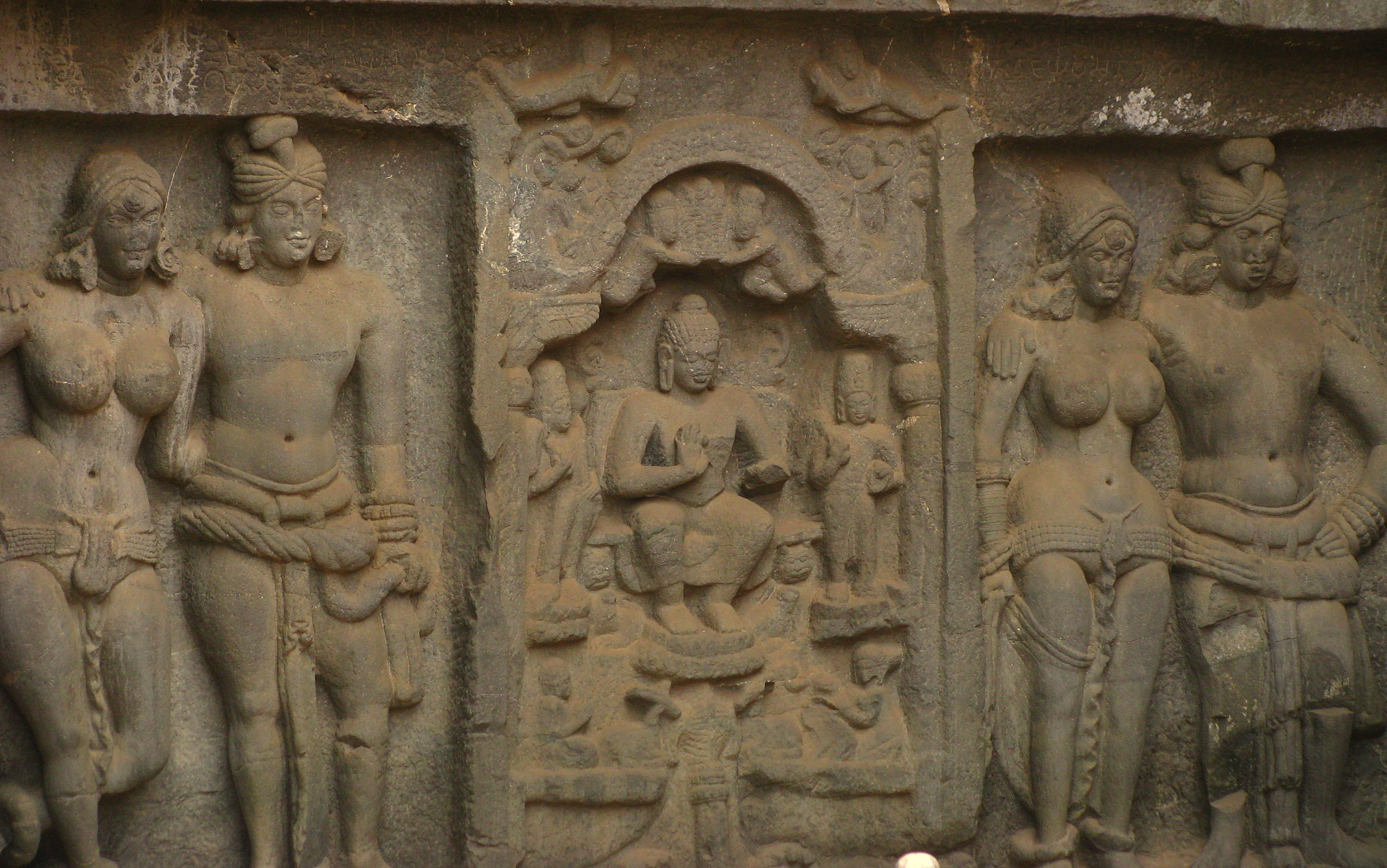 Rashtrakutans, Karla